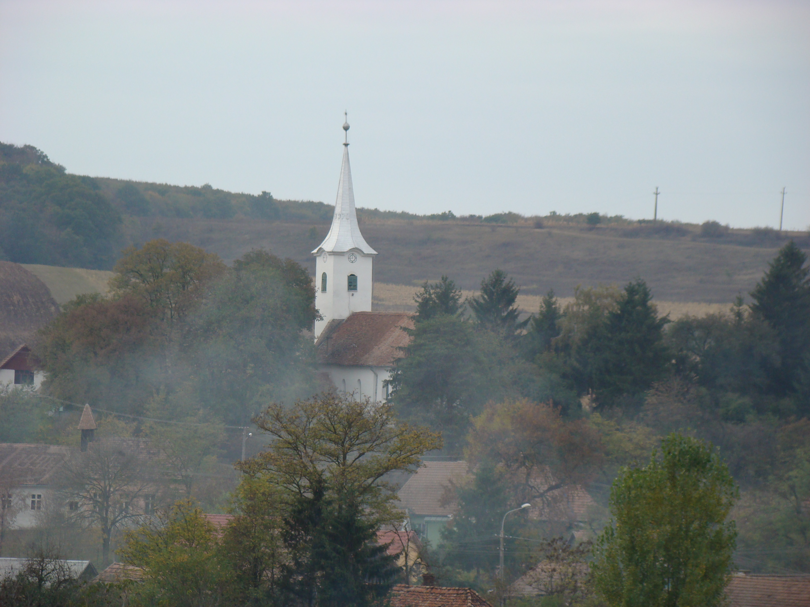 Vălenii, județul Mureș, panoramă de pe dealul pe care se află biserica de lemn